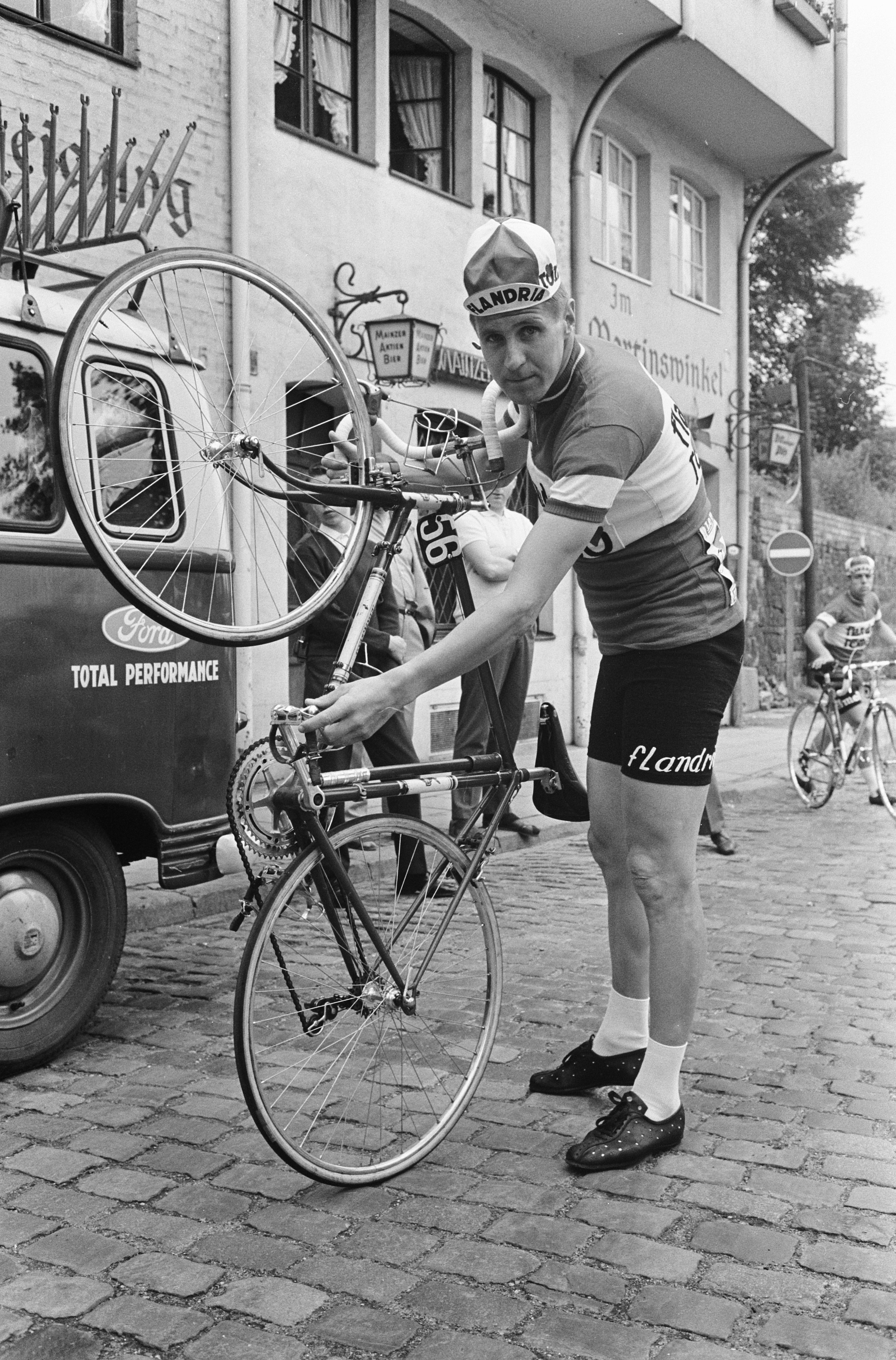 Tour de France , eerste etappe Keulen Luik, nr. 14 Peter Post met fiets en Televizierploeg.